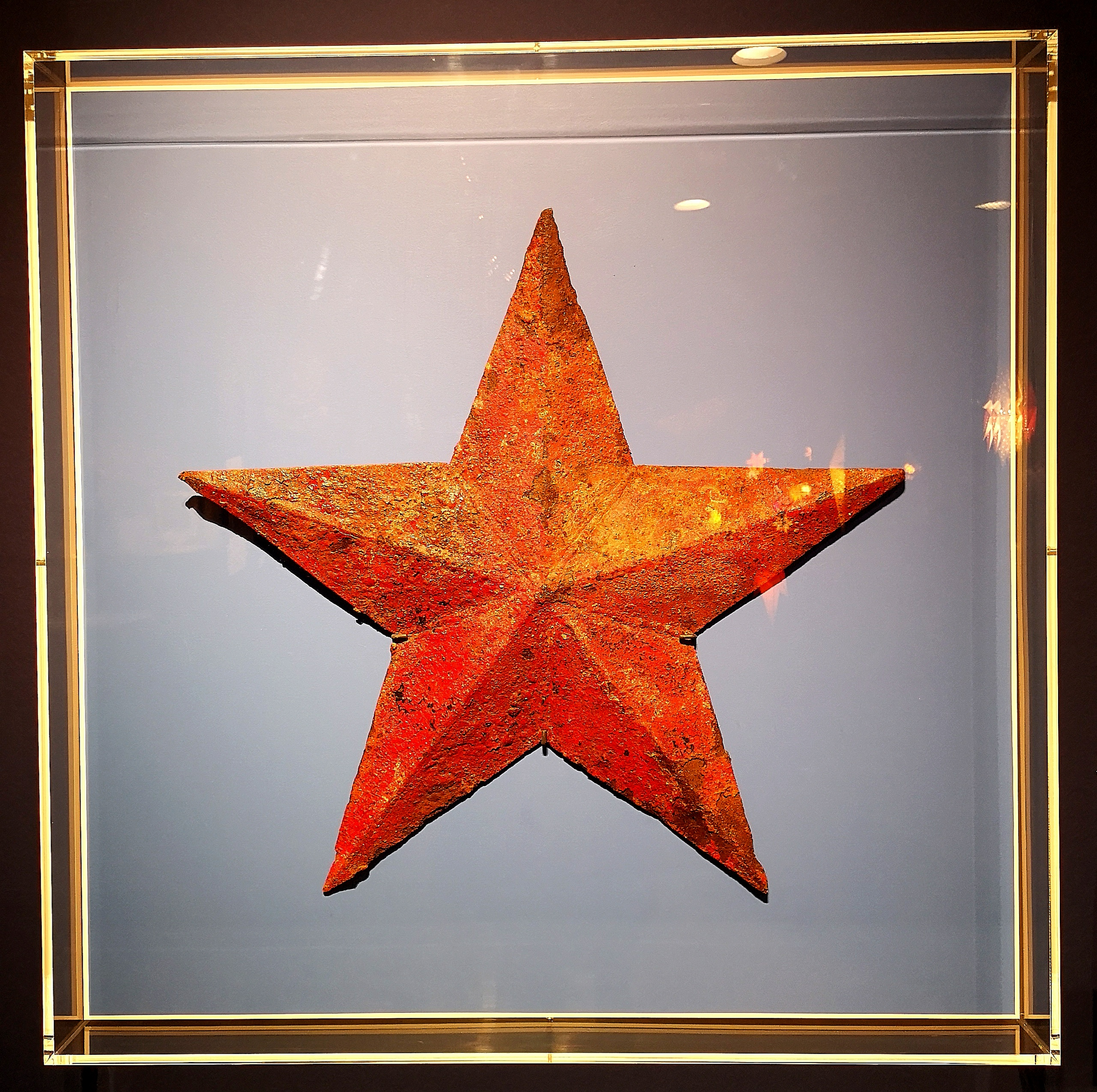 Ausstellungsstück der Sonderausstellung Sterne im Museum für Europäische Kulturen in Berlin Dahlem